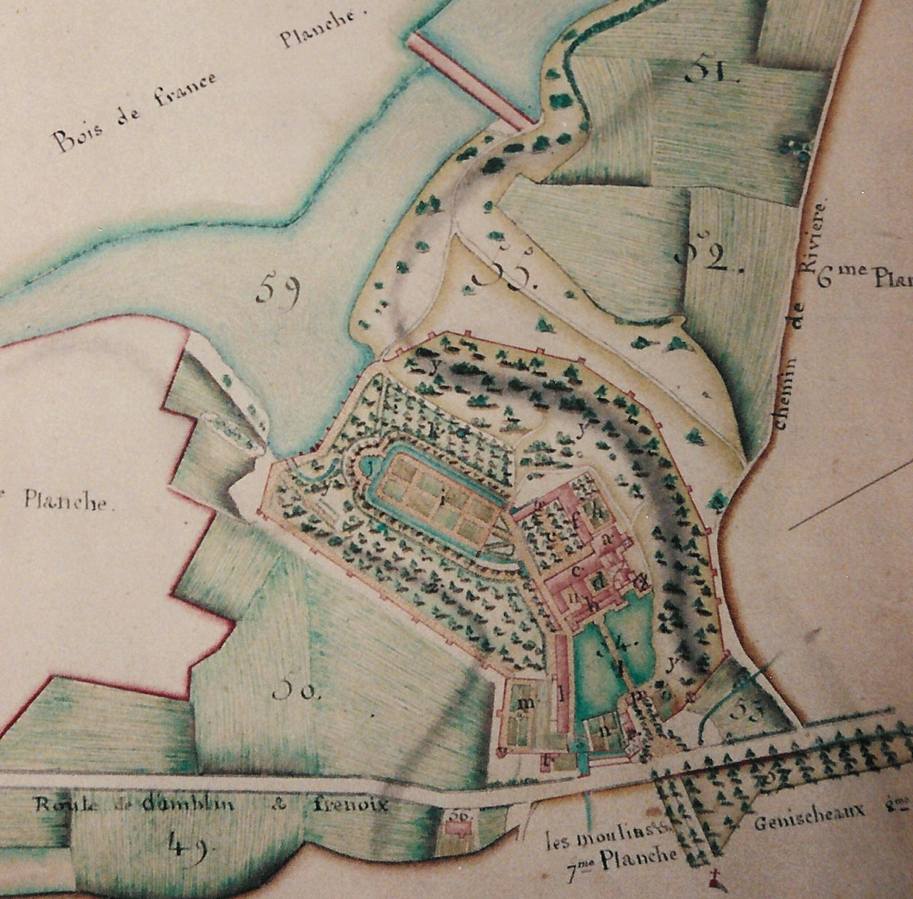 Photo d'une planche lors d'une exposition sur Morimond à Chaumont en 1992